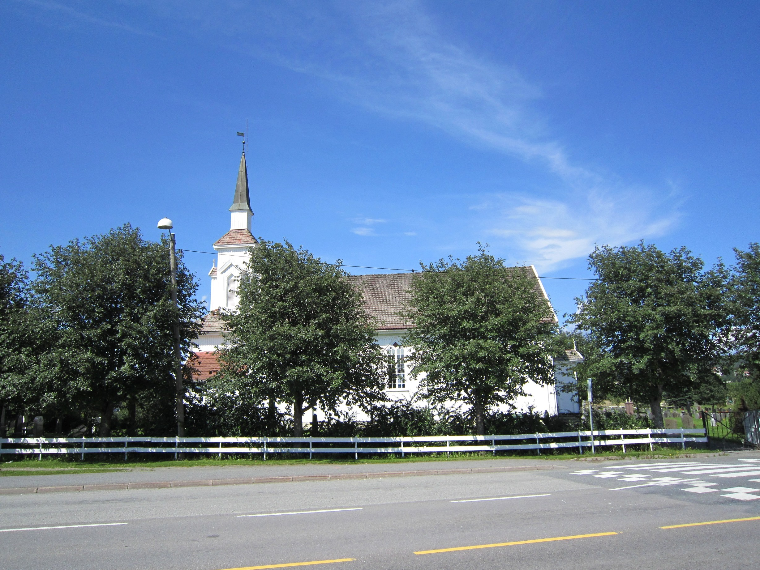 Riksvei 35 går forbi Tyristrand kirke.